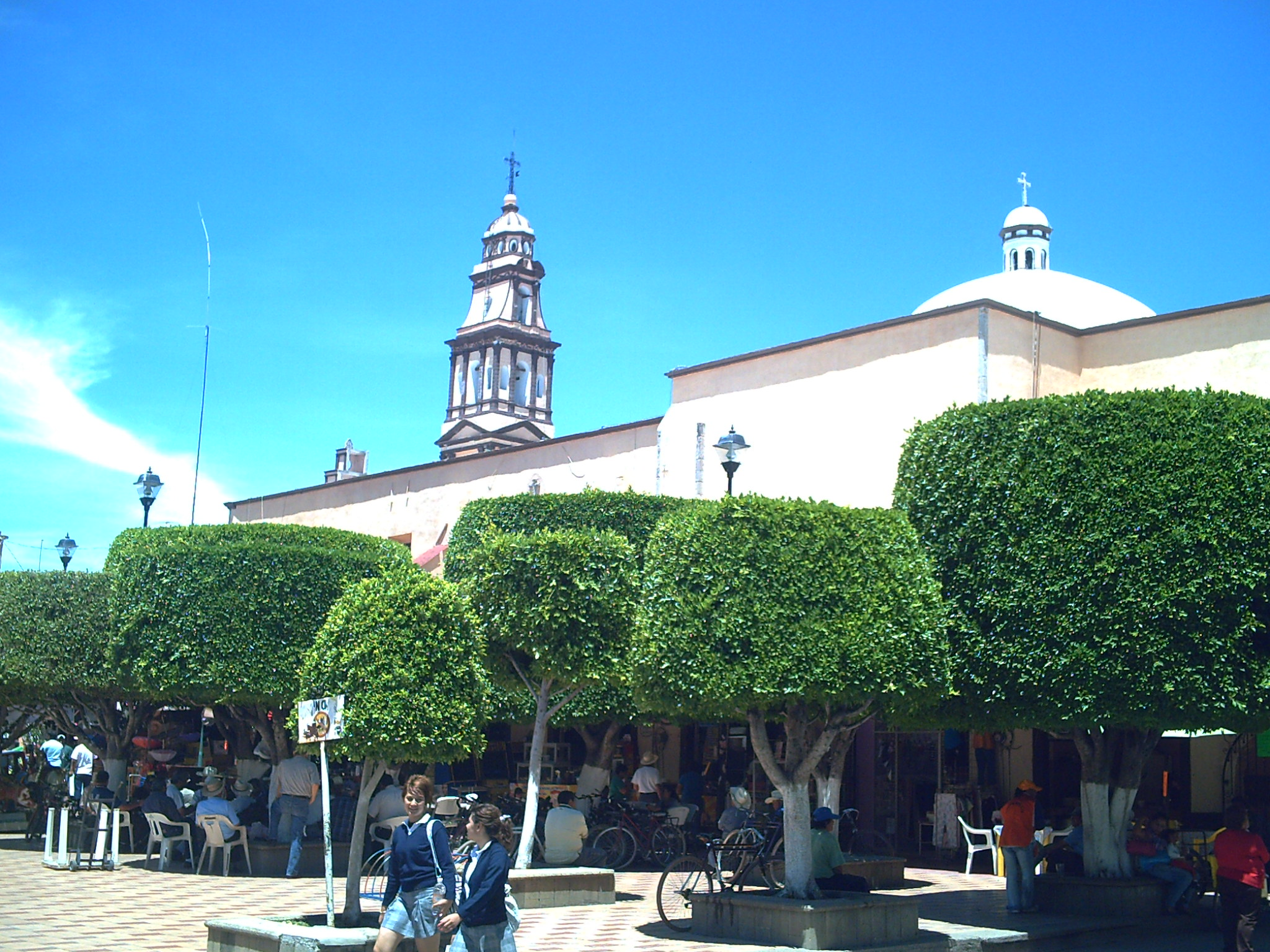 Vista de la parte trasera de la Parrouia de San Francisco del Rincón